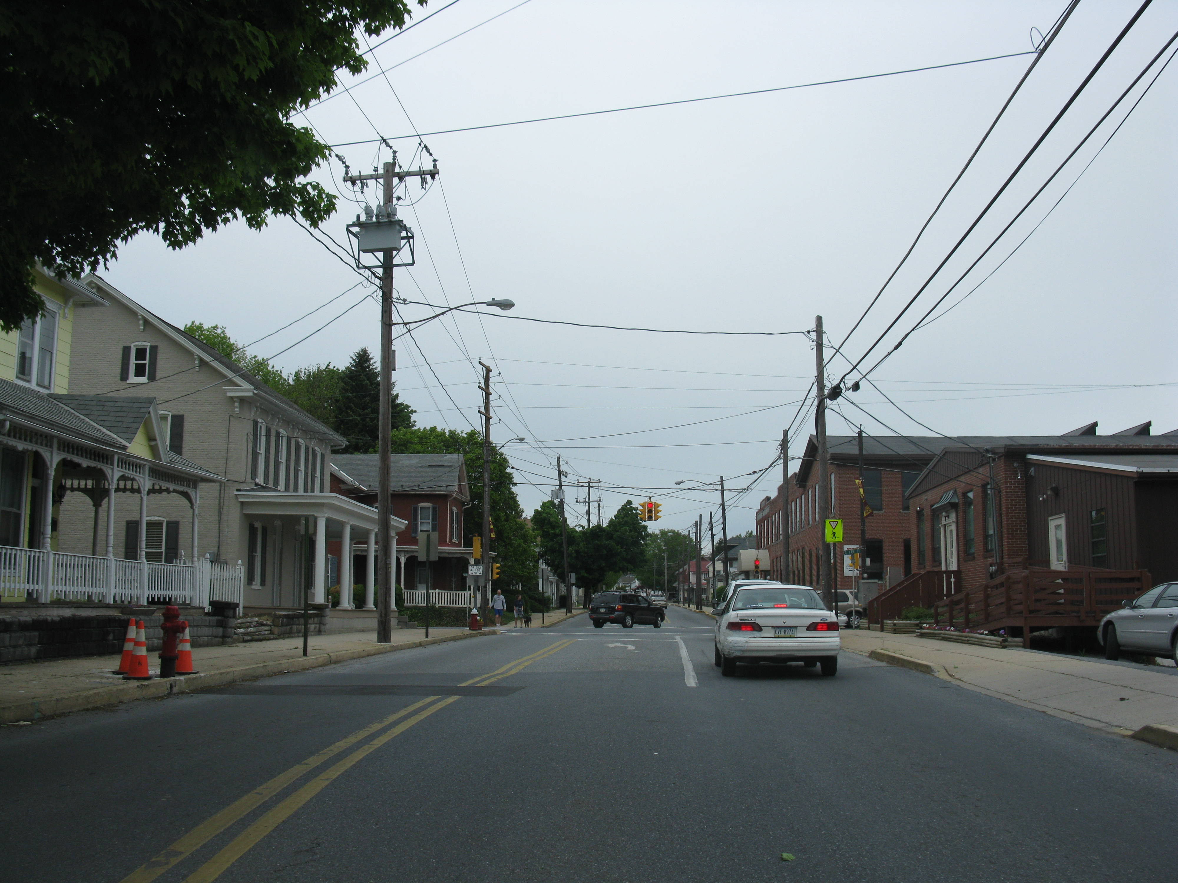 Main Street at SR 272, Akron, Pennsylvania